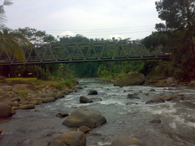 Jembatan Cibeet